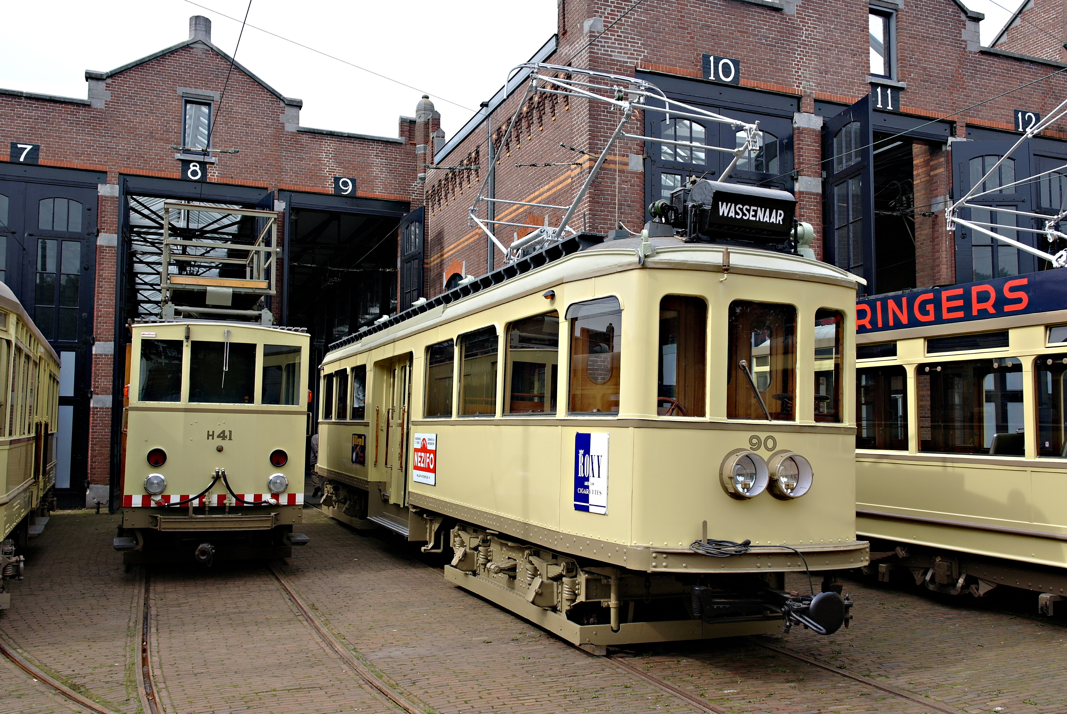 Ex-Limburgse tram (2)610 bij het HOVM gedurende manifestatie 'Retourtje Leiden'